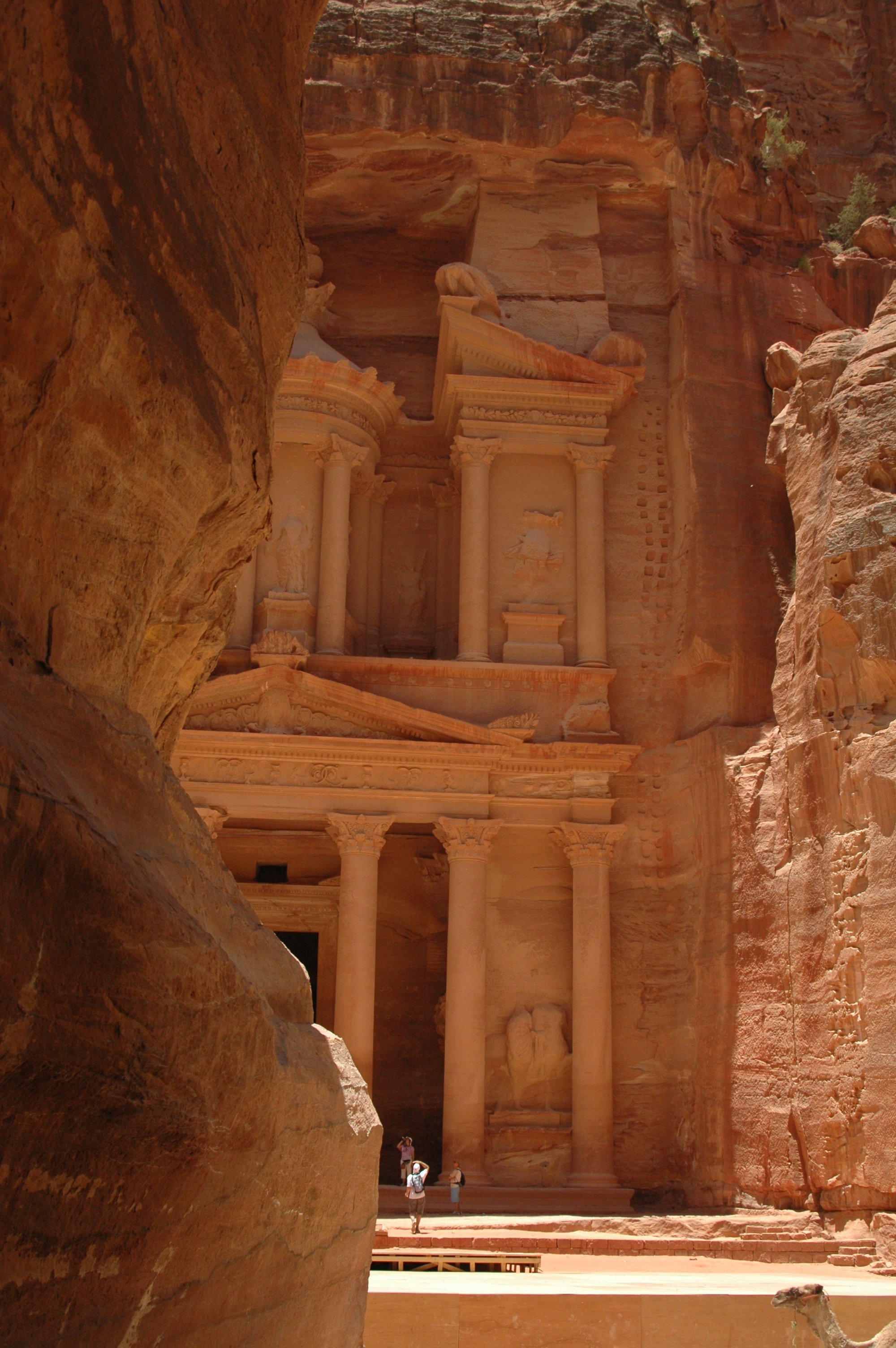 Petra, Jordan